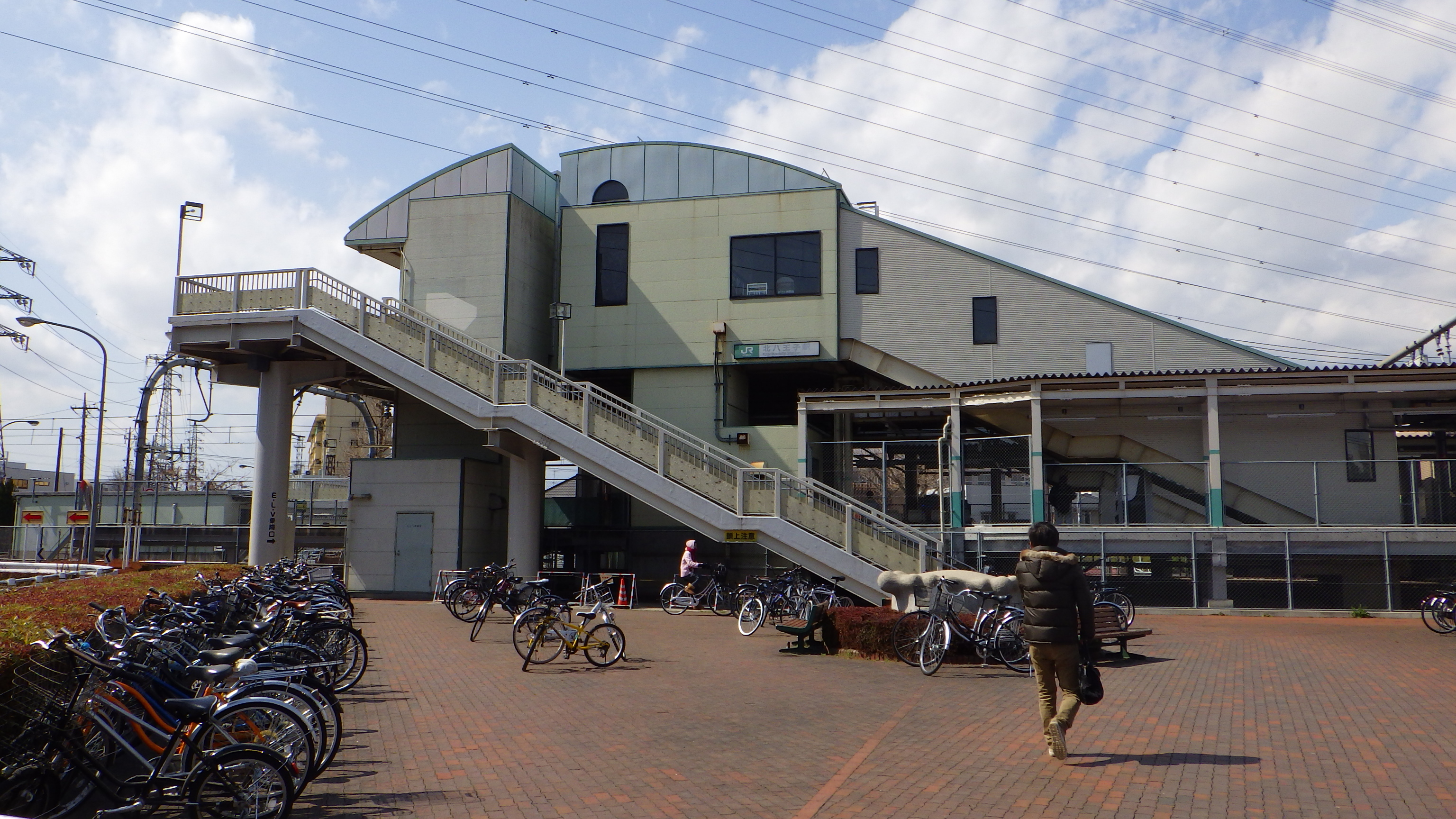 北八王子駅東口